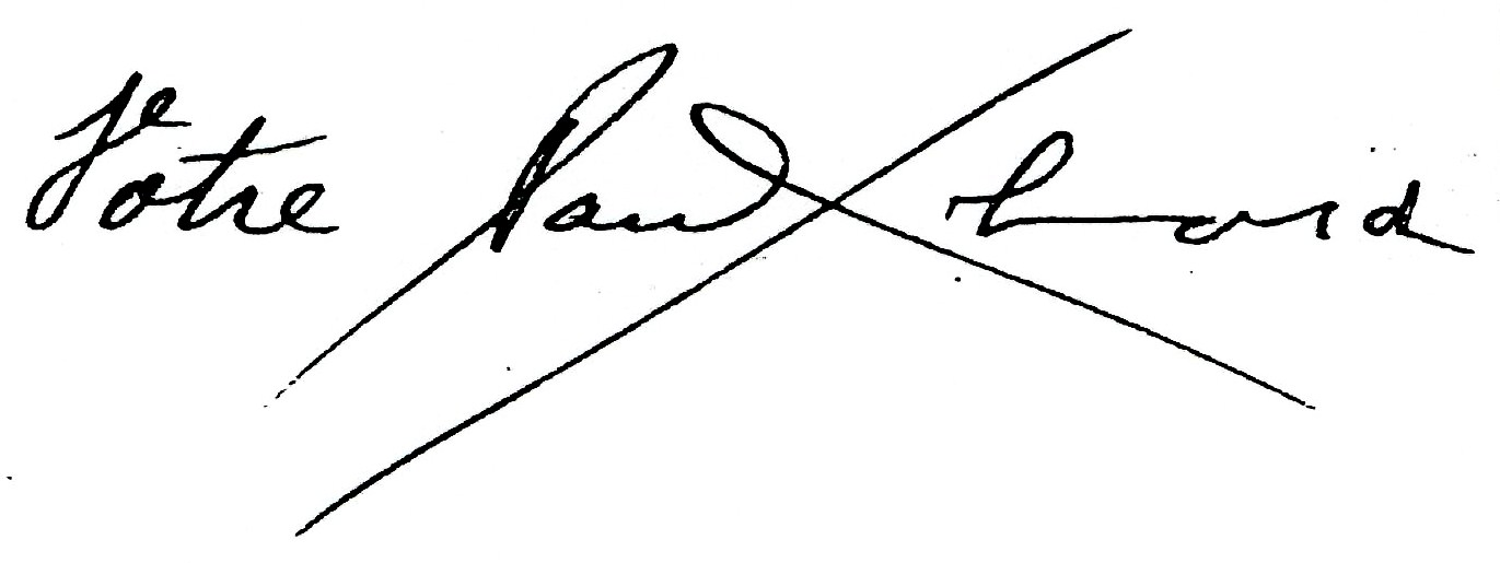 Signature du poète français Paul Eluard. Scan d'après correspondance. Cette image ou le texte qui y est représenté est seulement composé de formes géométriques simples et de texte. Elle n’atteint pas le seuil d'originalité nécessaire pour la protection du droit d’auteur, et est donc du domaine public.